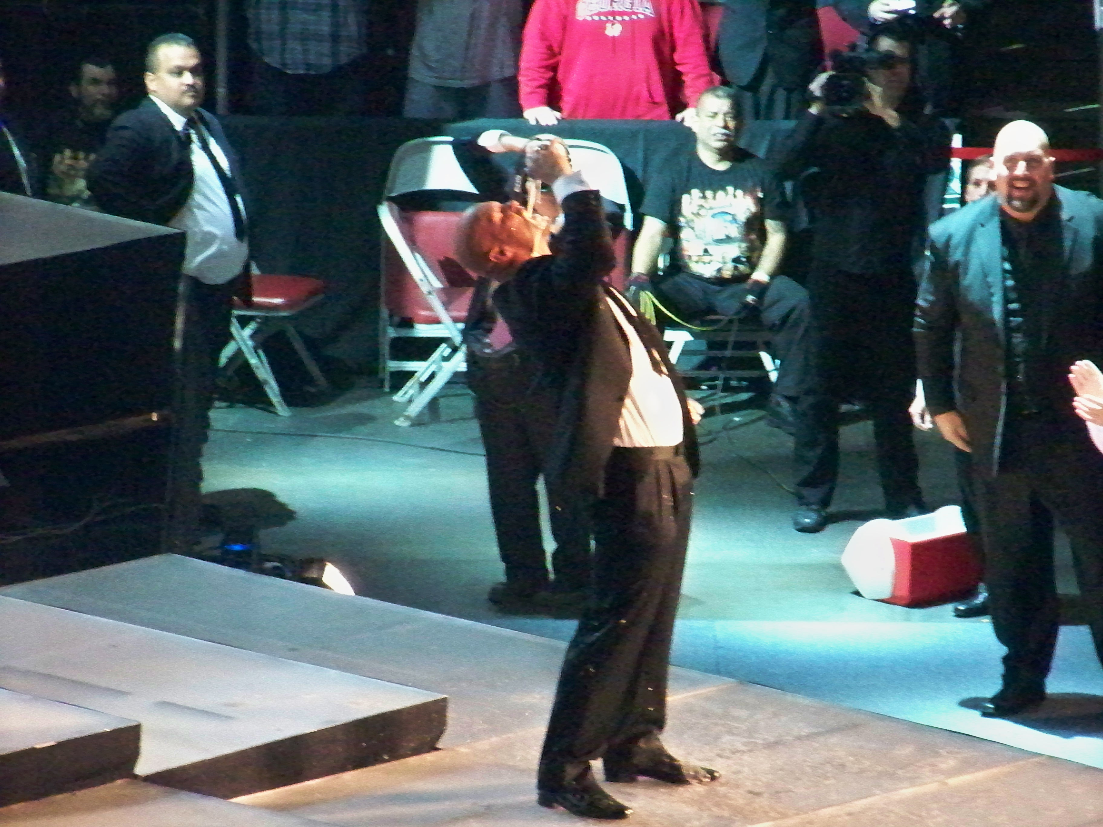 Comment pas finir avec avec des bieres?